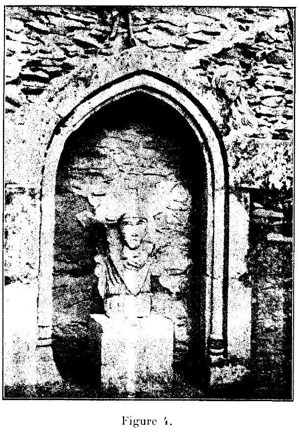 Le Donjon de Courmenant, ses origines, ses seigneurs et possesseurs, son musée